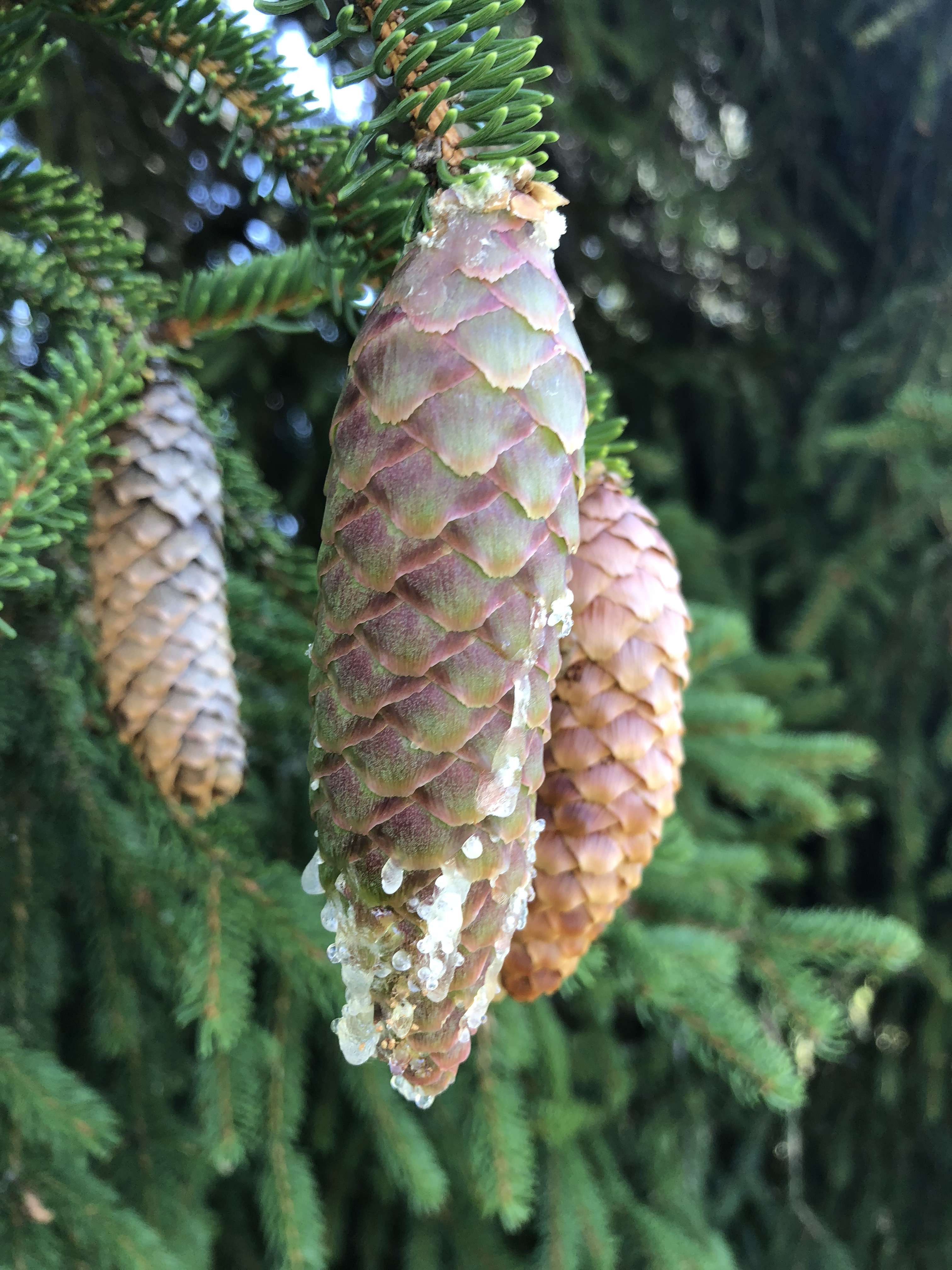 Austretendes Harz am Zapfen einer Rottanne